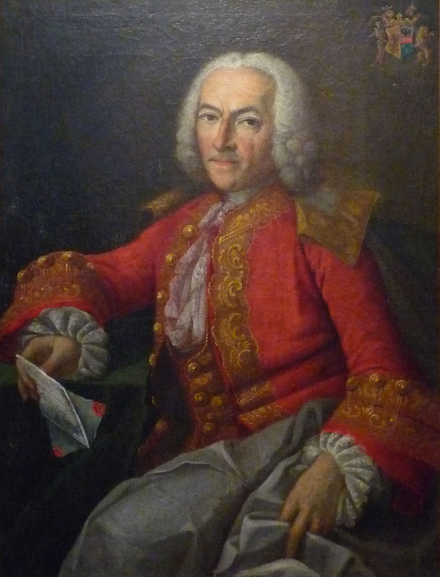 Baron Jean François de Spon (1696-1773), Syndic Royal, directeur de la Chancellerie